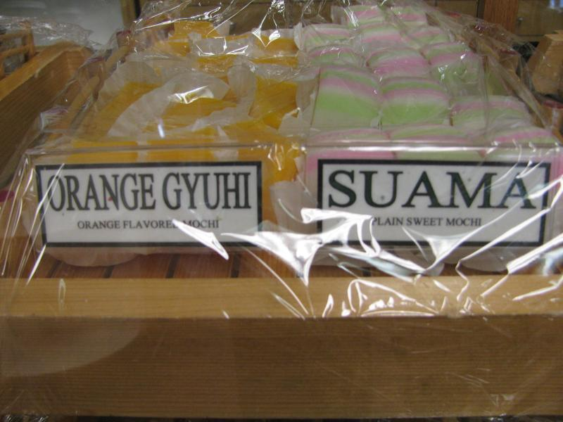 orange gyuhi and suama